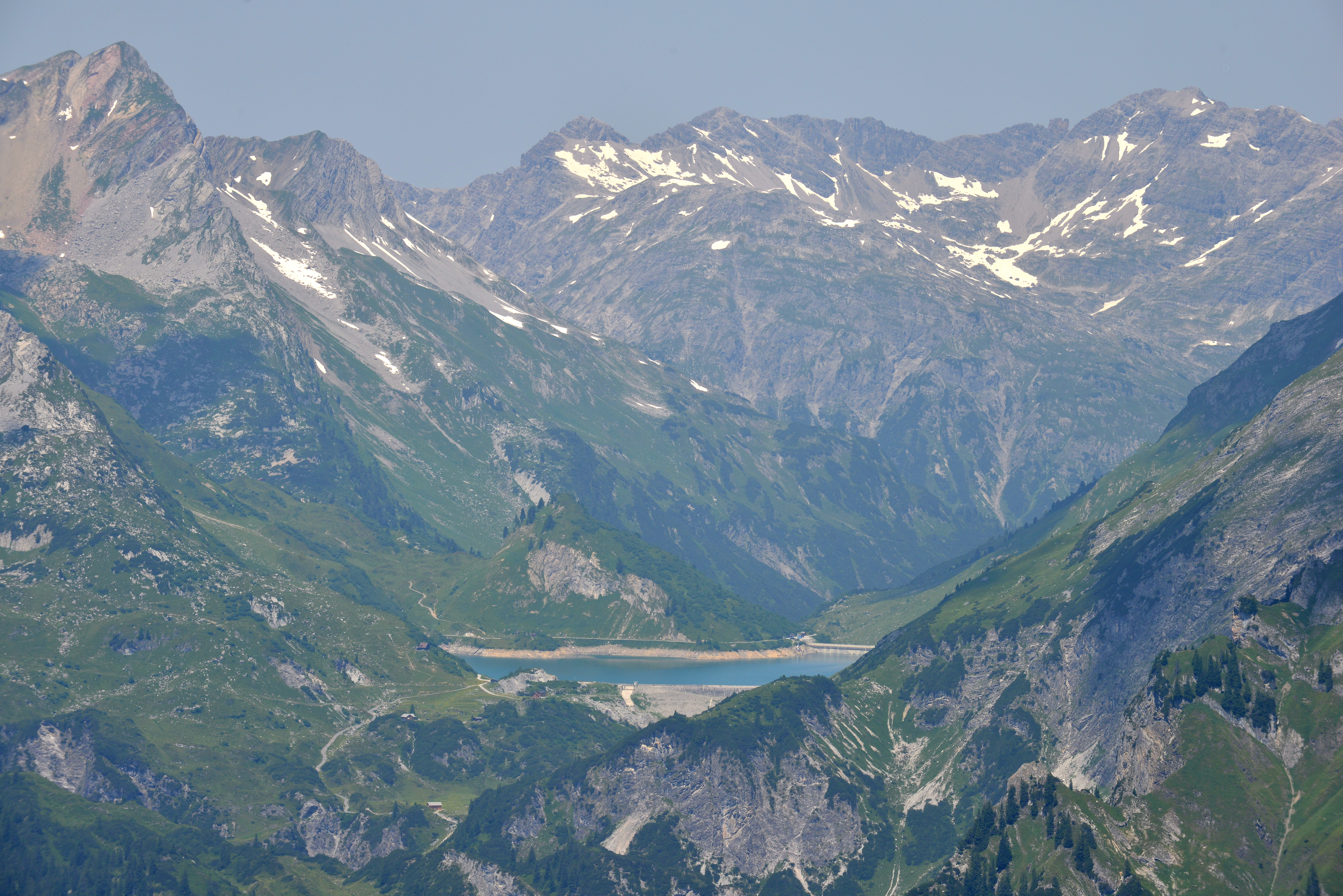 Der Spullersee, gesehen vom Reutlinger Weg oberhalb der Kaltenberghütte in Stuben.